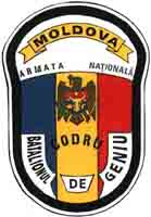 Batalionul Geniu Independent